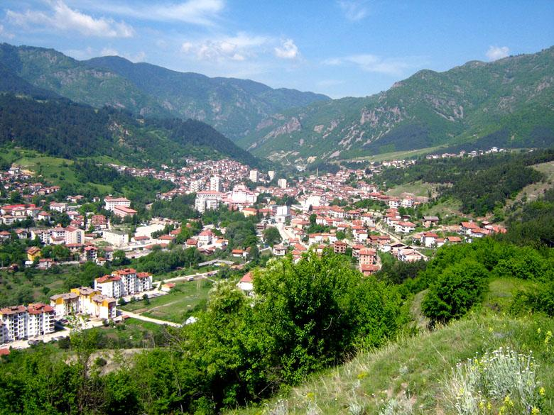 Devin, Bulgaria.